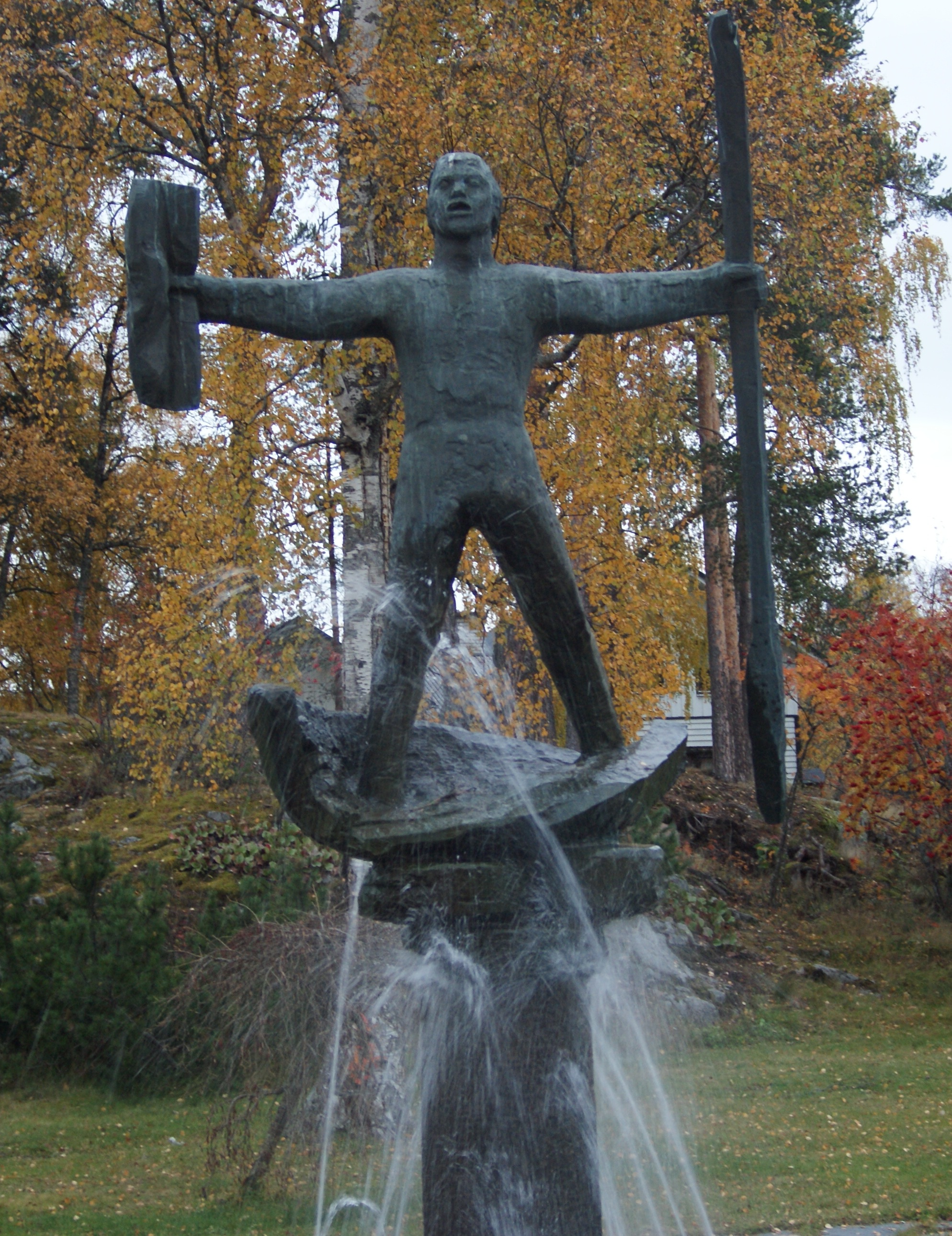 Staty av vildhussen ståendes i Hammarstrand